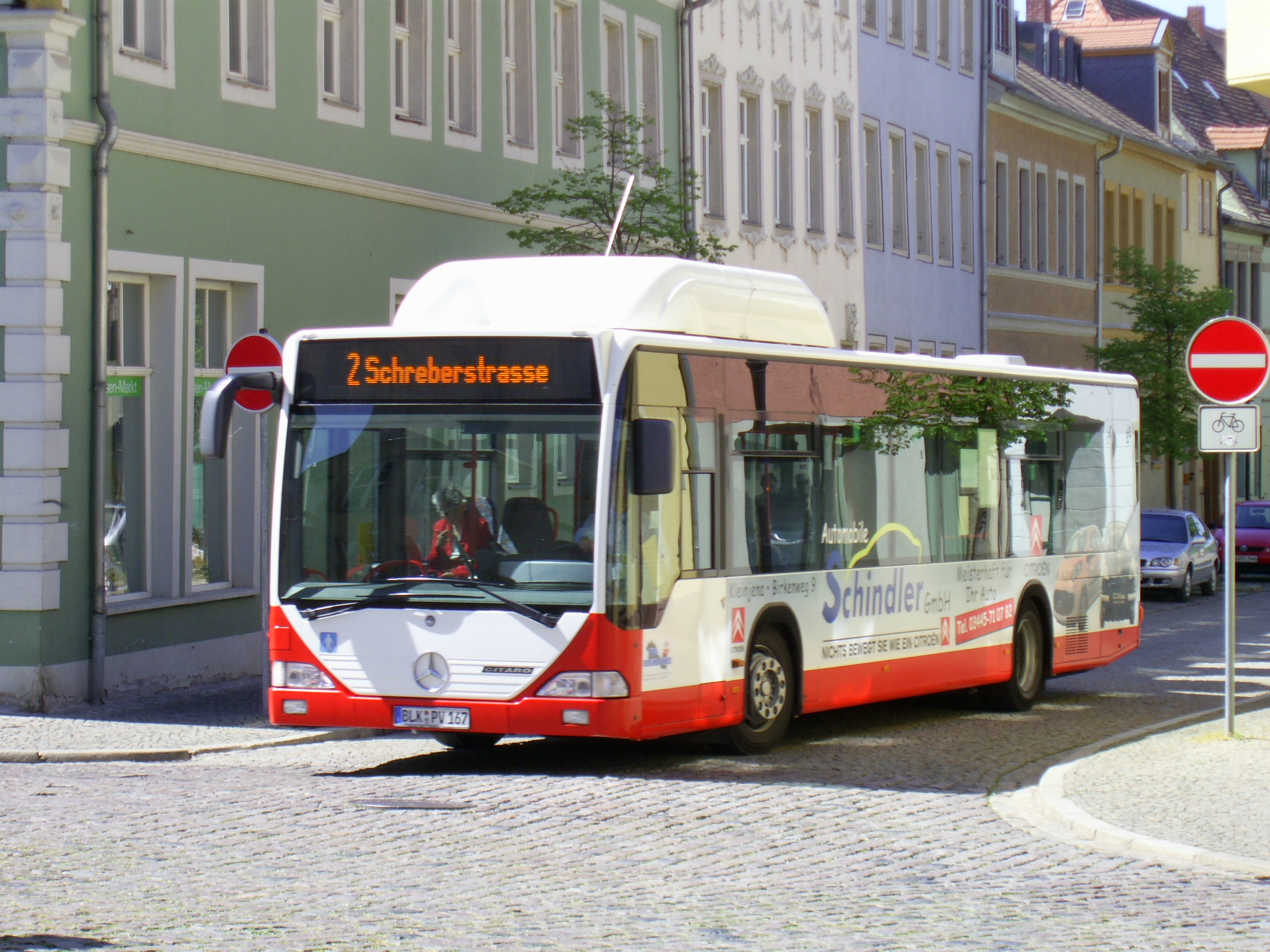 Mercedes Citaro O 530 CNG im Stadtverkehr Naumburg (Saale)